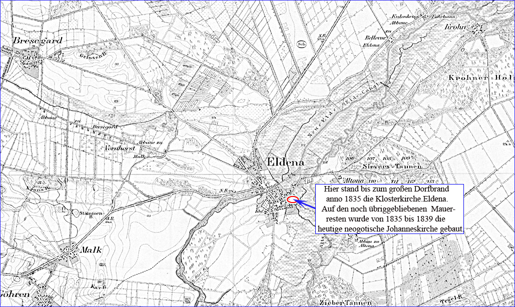 Ungefähre Lage der Klosterkirche des einstigen Nonnenklosters Eldena in der Gemeinde Eldena. Die Gemeinde Eldena gehört zum Amt Grabow im Landkreis Ludwigslust-Parchim in Mecklenburg-Vorpommern.